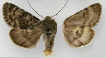 Lasionycta uniformis fusca male